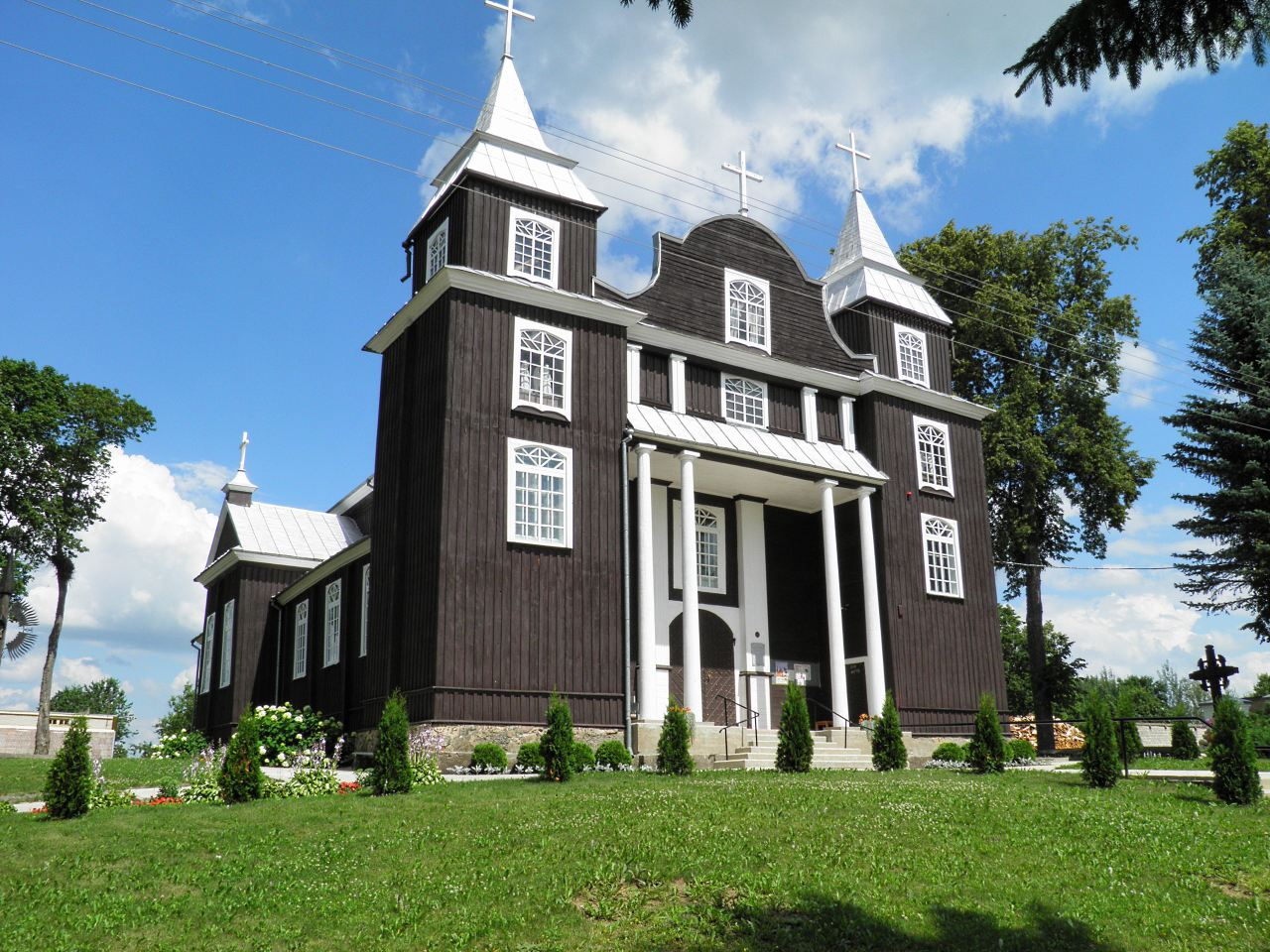 Antazaves baznīca (1)